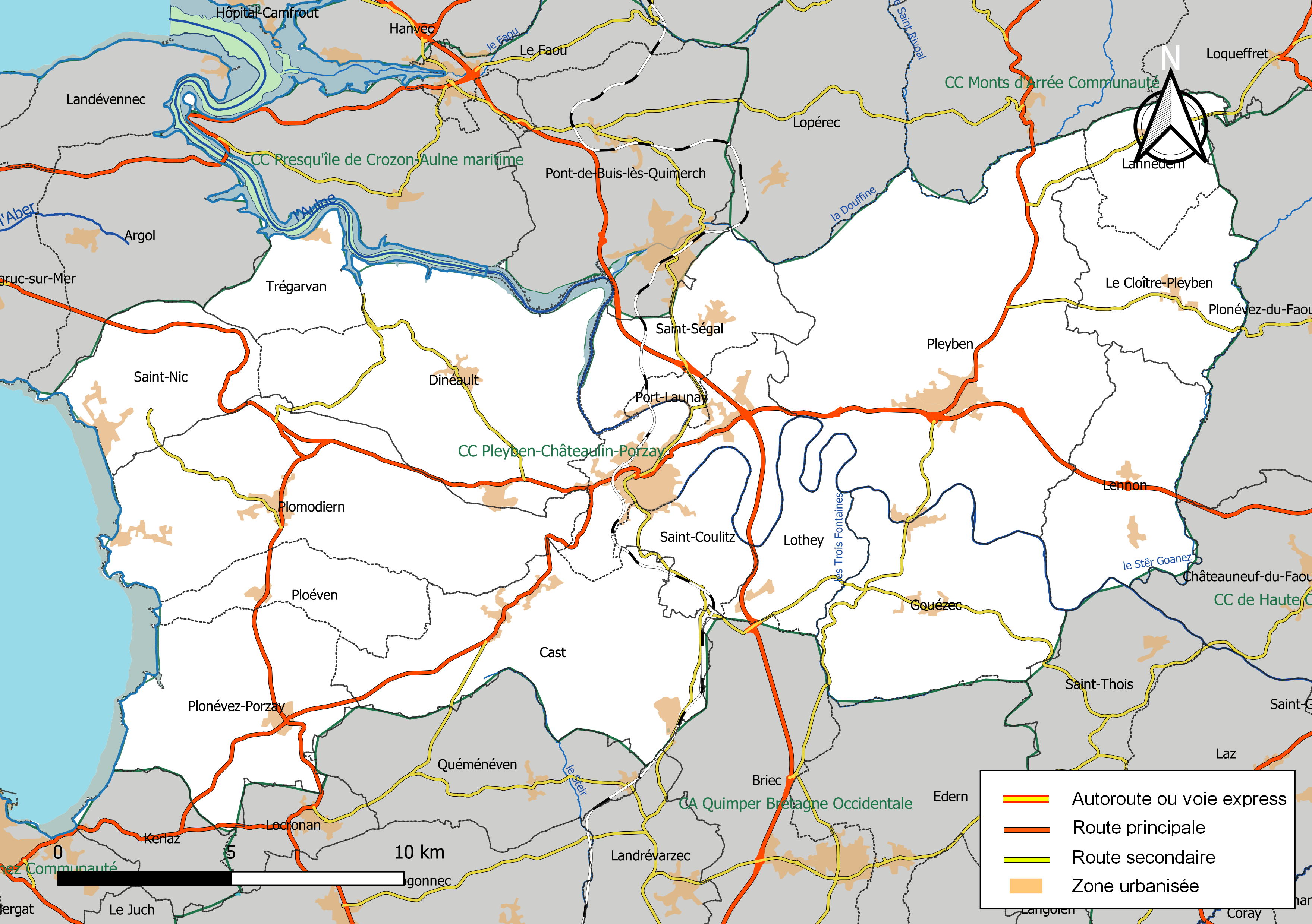 Carte géographique de la Communauté de communes Pleyben-Châteaulin-Porzay, département du Finistère, France. Composition au 1er janvier 2019.